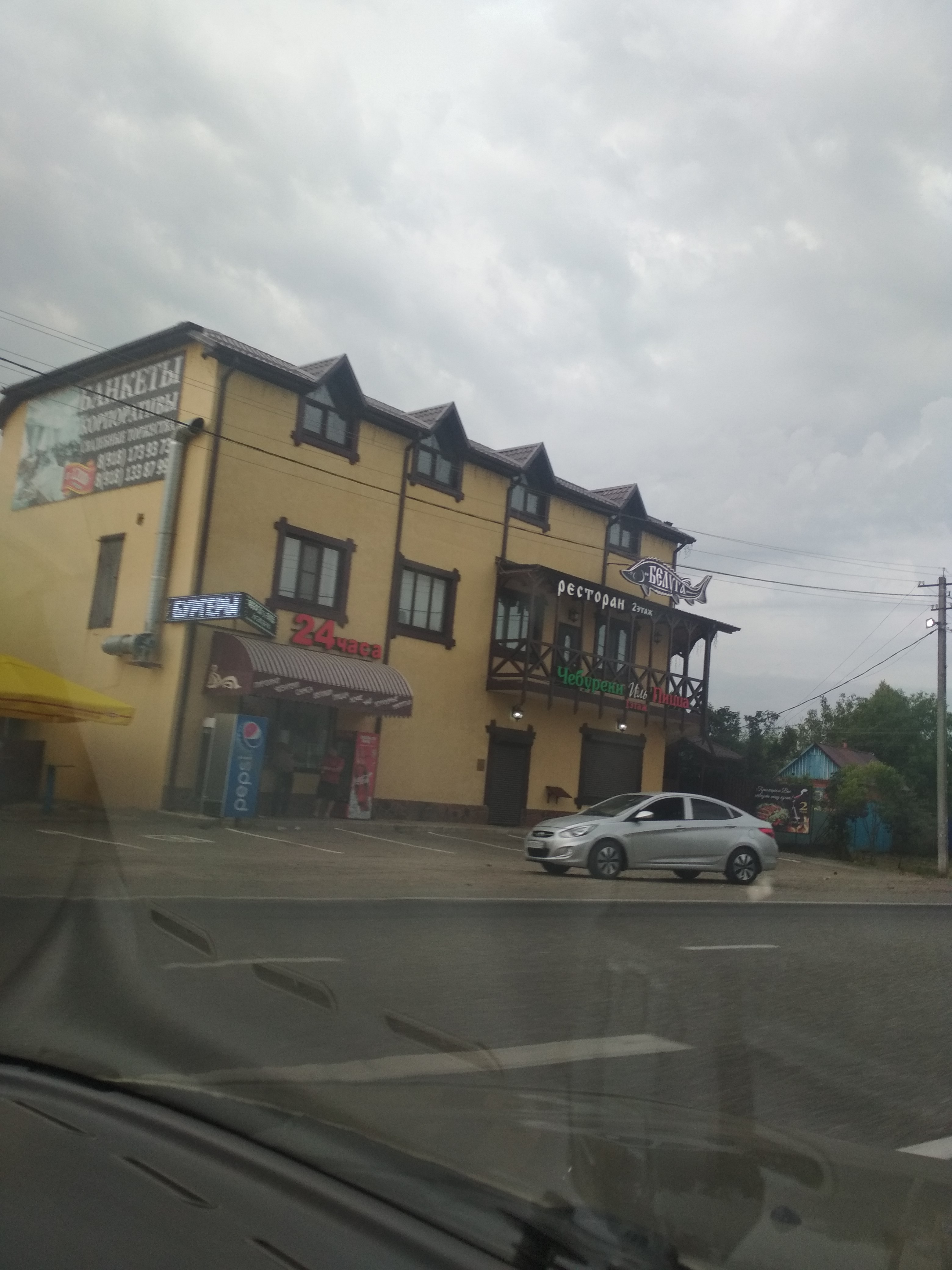 Нохчийн: Ресторан "Белуга"